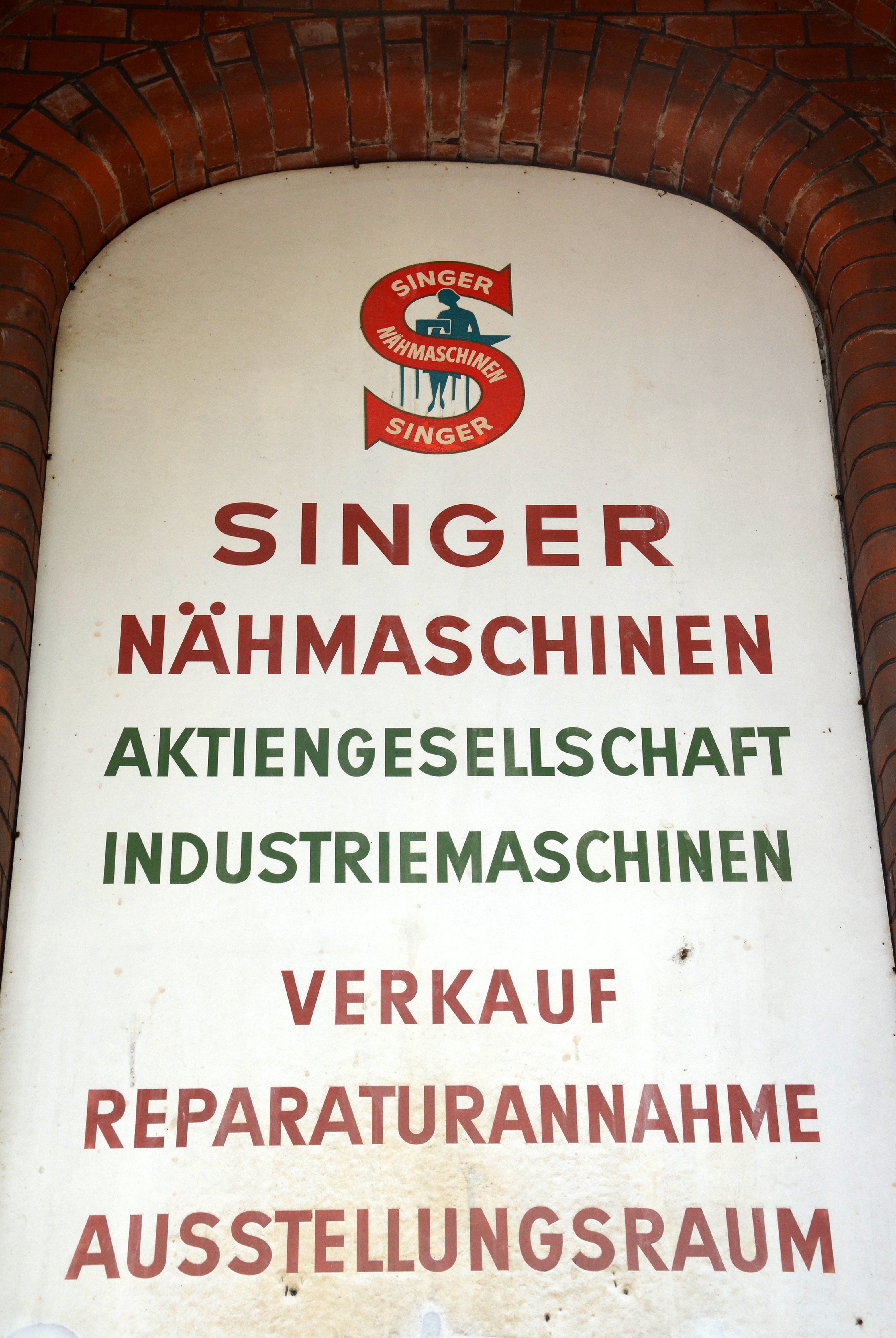 Detail-Blick auf das denkmalgeschützte, in den 1890er Jahren erbaute Haus Jakobistraße 9 Ecke Edenstraße in Hannover, Stadtteil List. Der ehemalige Verwaltungssitz der Fabrik des Heizungsbauers Fritz Kaeferle zeigt über dem Hauseingang das Fabrikzeichen des Maikäfers ...